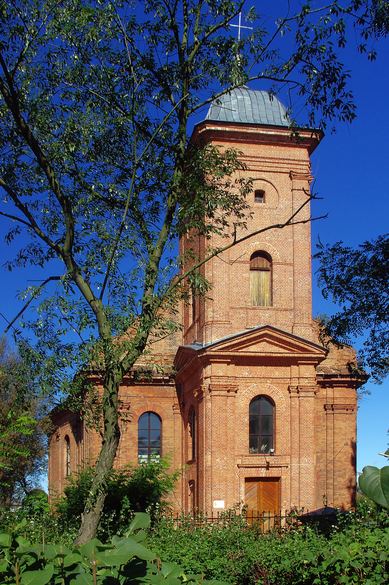 Rydzyna, ul. Wolności - zespół kościoła ewangelickiego: kościół ewangelicki pw. Świętego Krzyża z lat 1779-1783, cmentarz przykościelny, pastorówka z XVIII/XIX w.